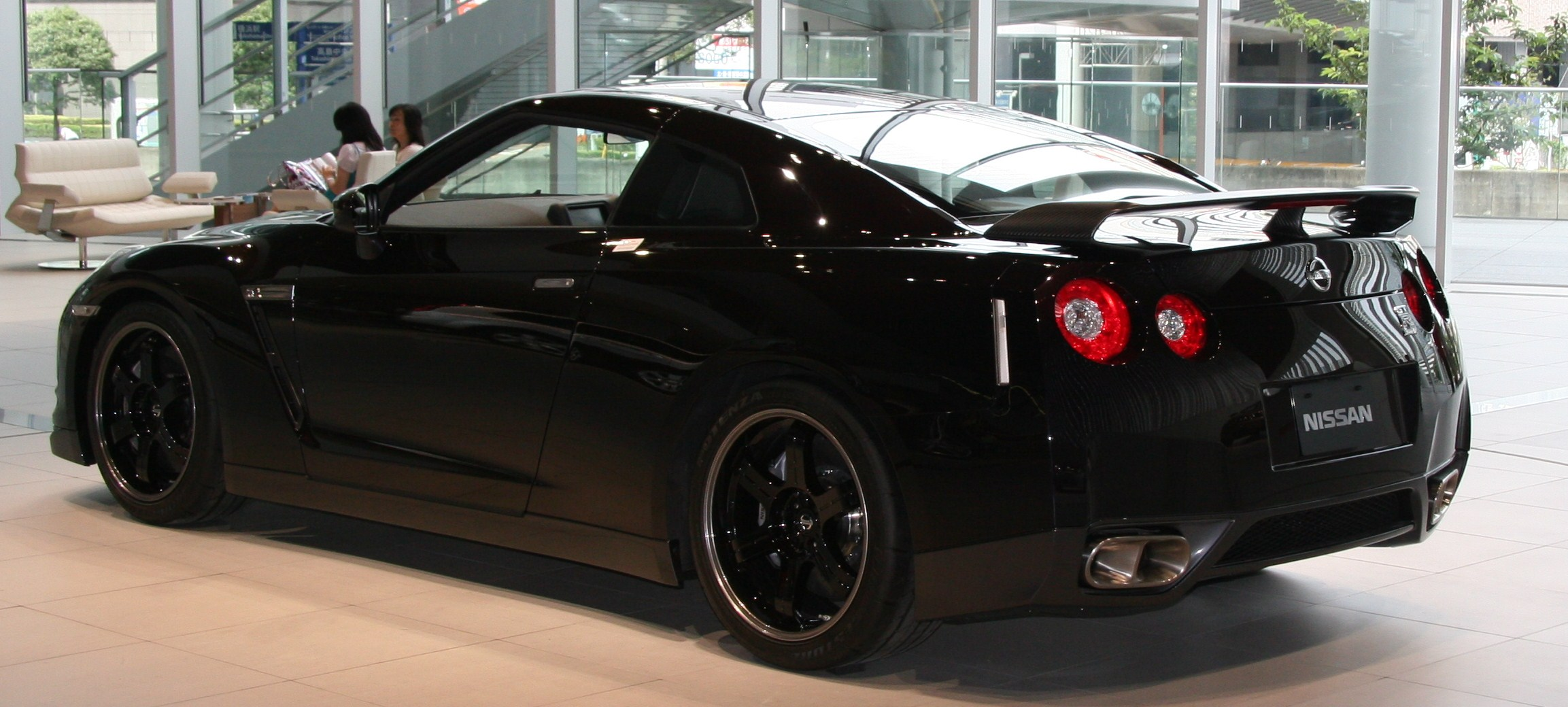 NISSAN GT-R